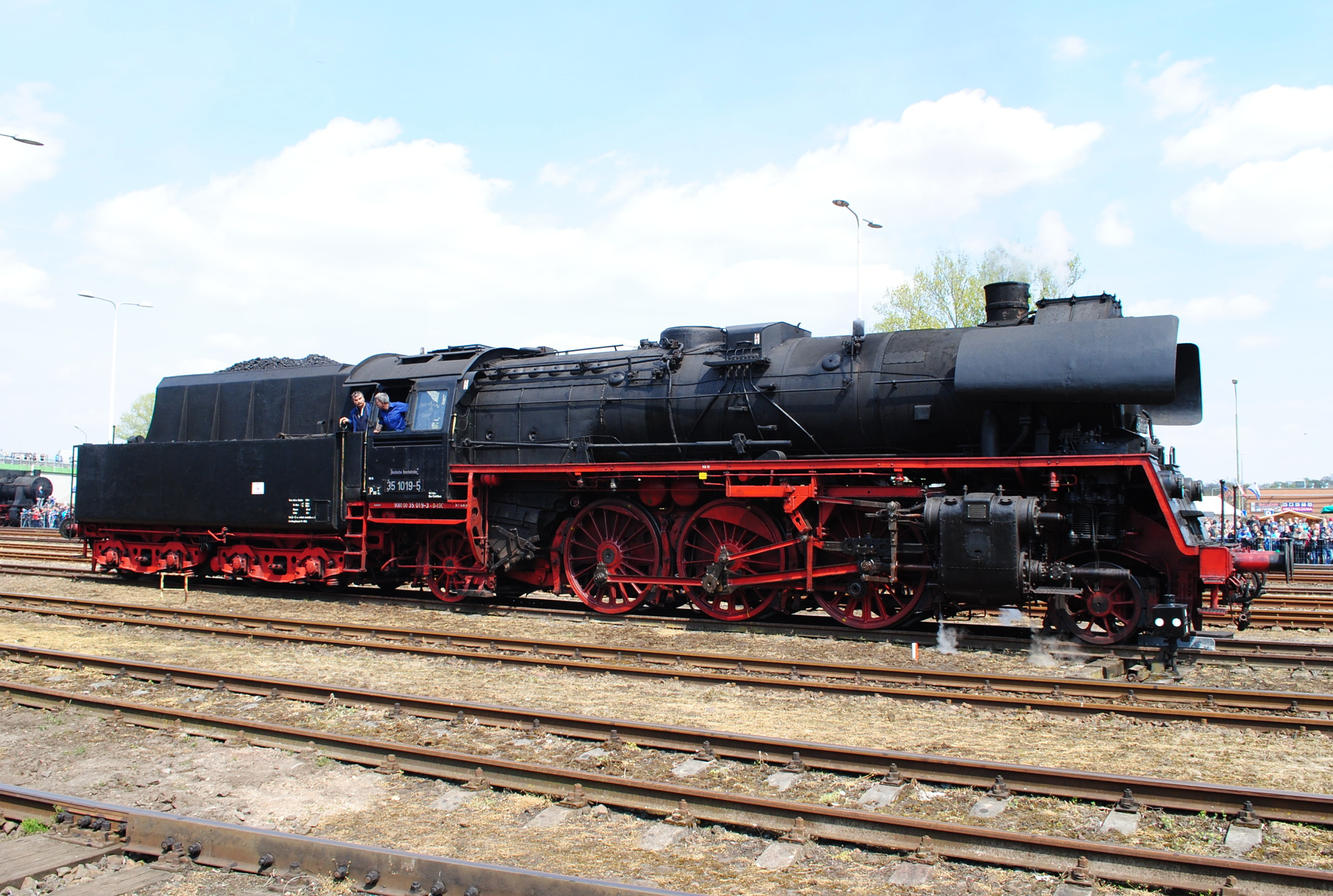 Baureihe 23.10 podczas Parady Parowozów w Wolsztynie.